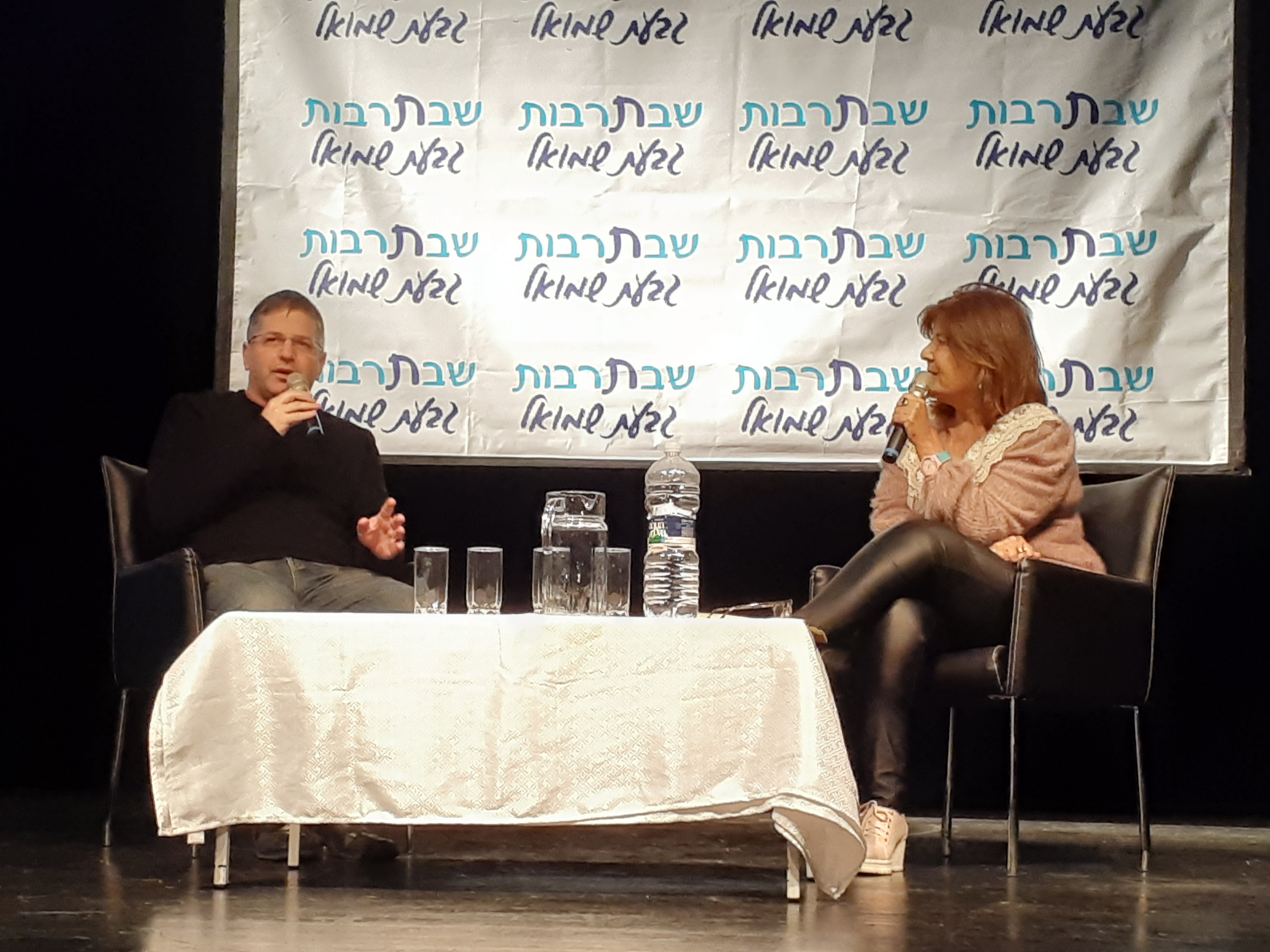 ח"כ יואב קיש באירוע שבתרבות בגבעת שמואל עם רינה מצליח